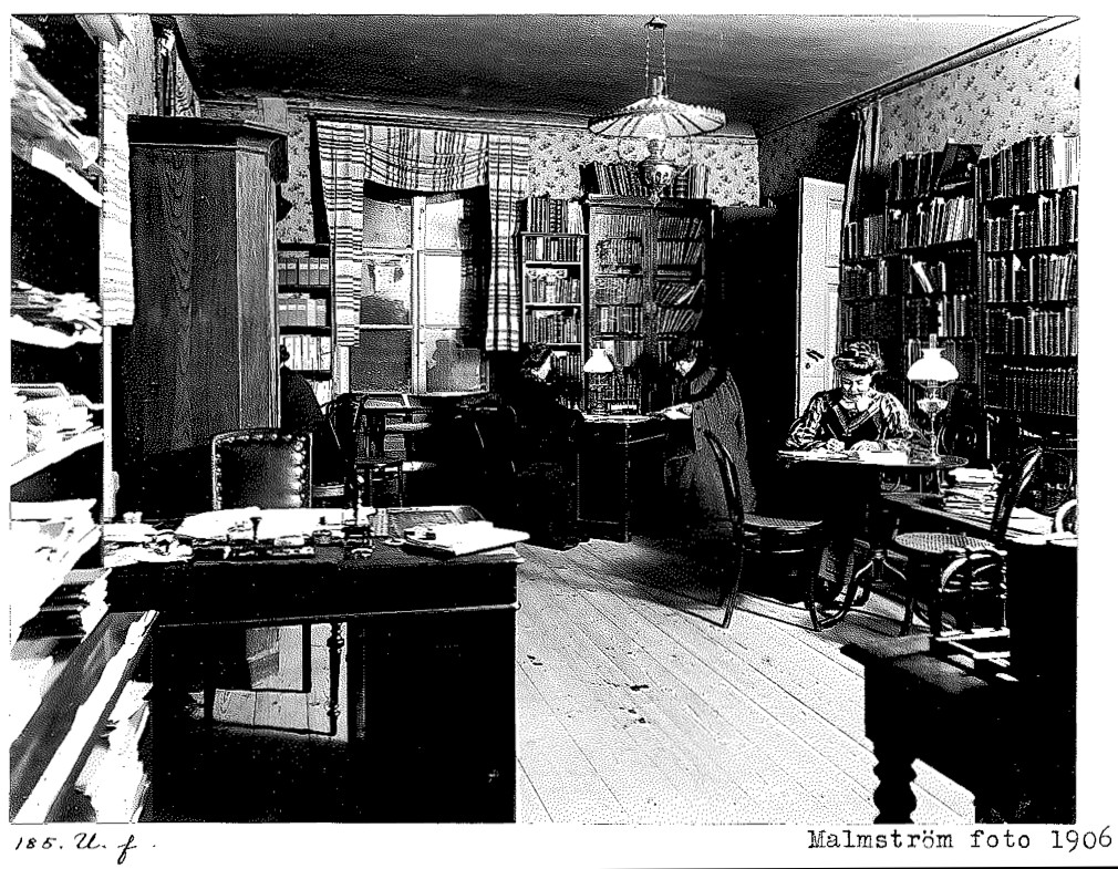 Fredrika Bremer-förbundet arbetar på ett kontor på Drottninggatan 54 i Stockholm. Foto från 1906.